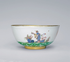 Bemalung wohl von Johann Gregorius Höroldt, 1726 Meißener Porzellan-Sammlung Stiftung Ernst Schneider in Schloss Lustheim